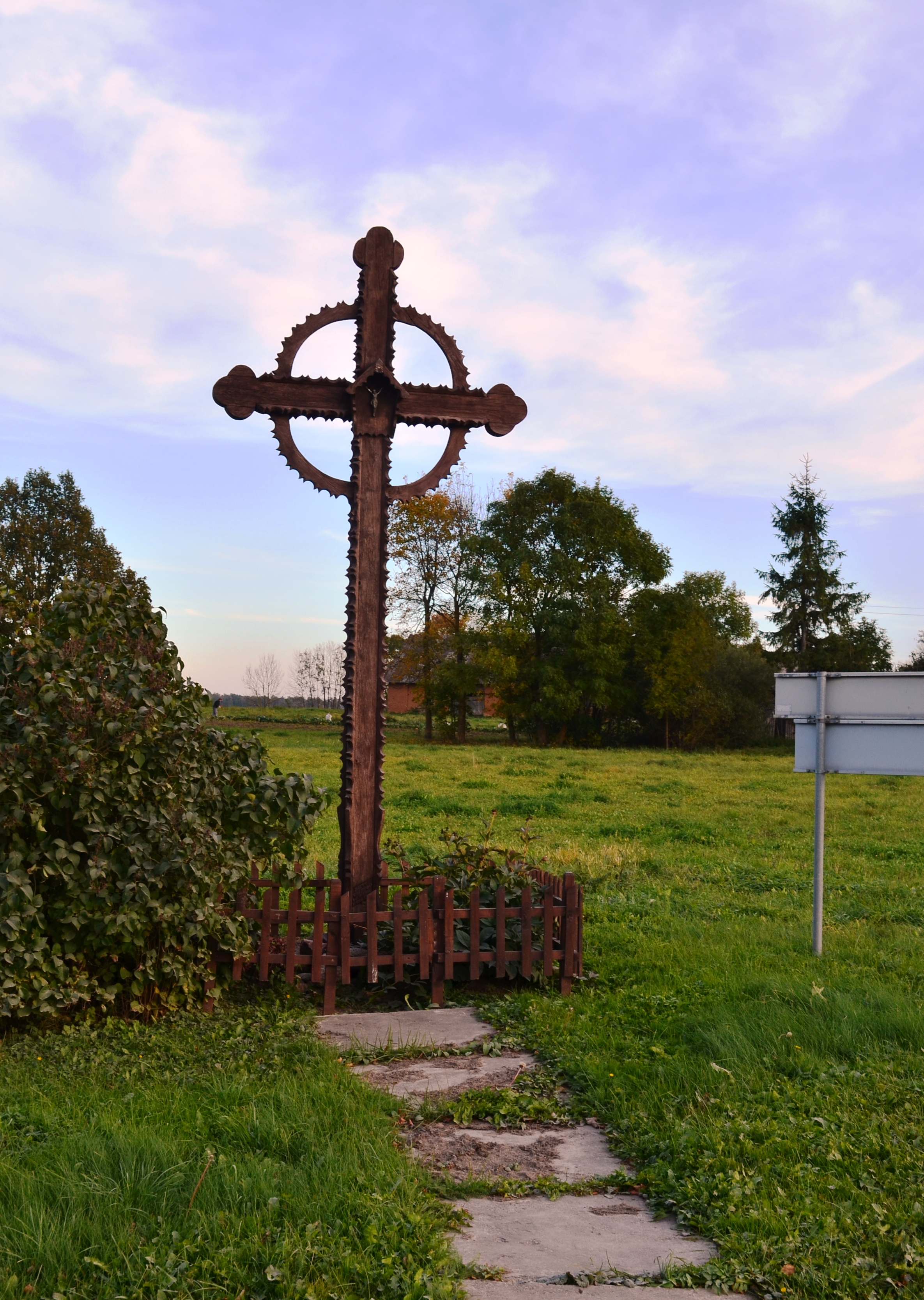 Kryžius Devynduoniuose, Gudžiūnų sen., Kėdainių raj.